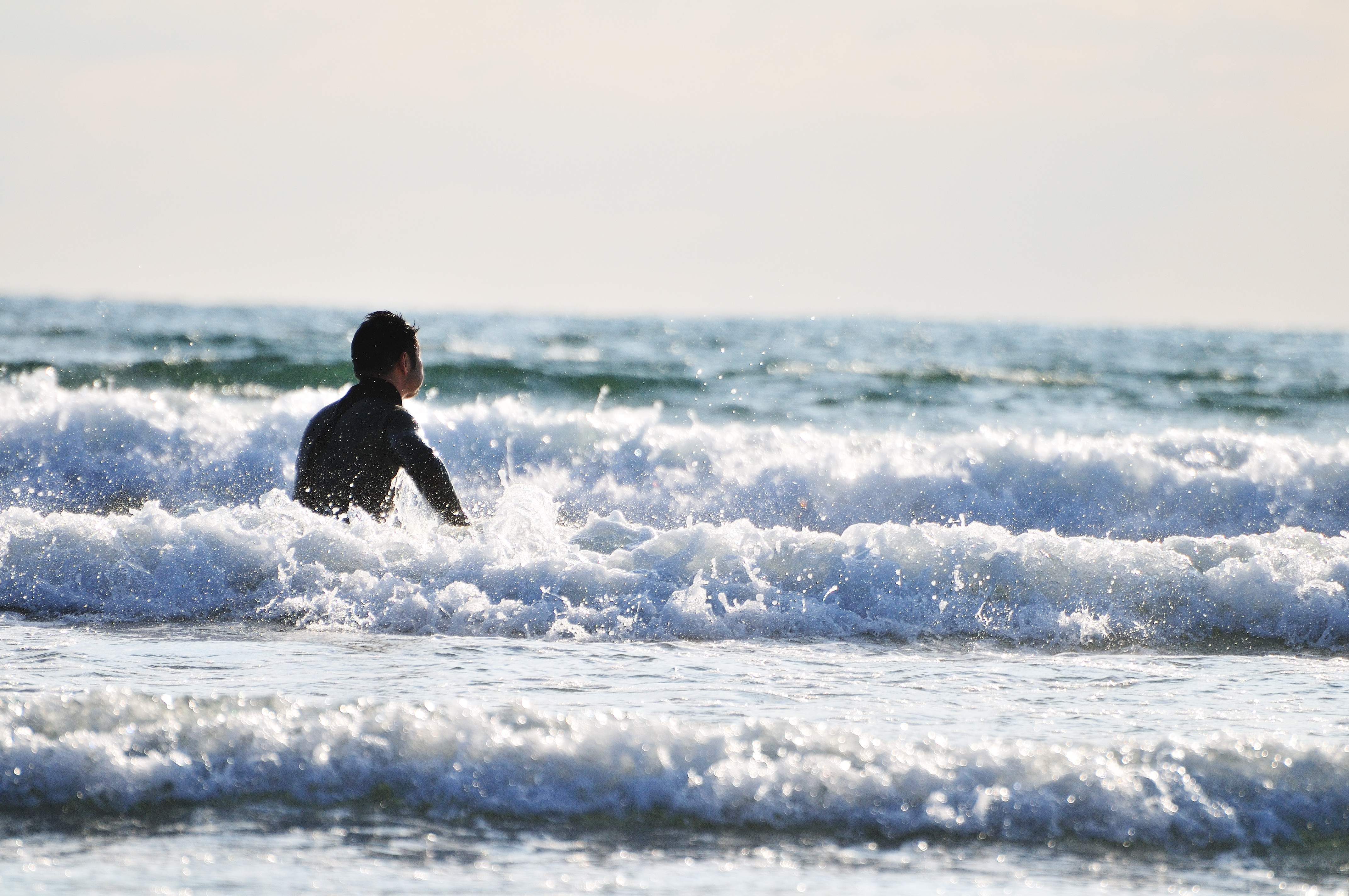 Een surfer bij het strand van Kugenuma. Nikon D300 + AF-S VR 70-300mm f/4.5-5.6G IF-ED